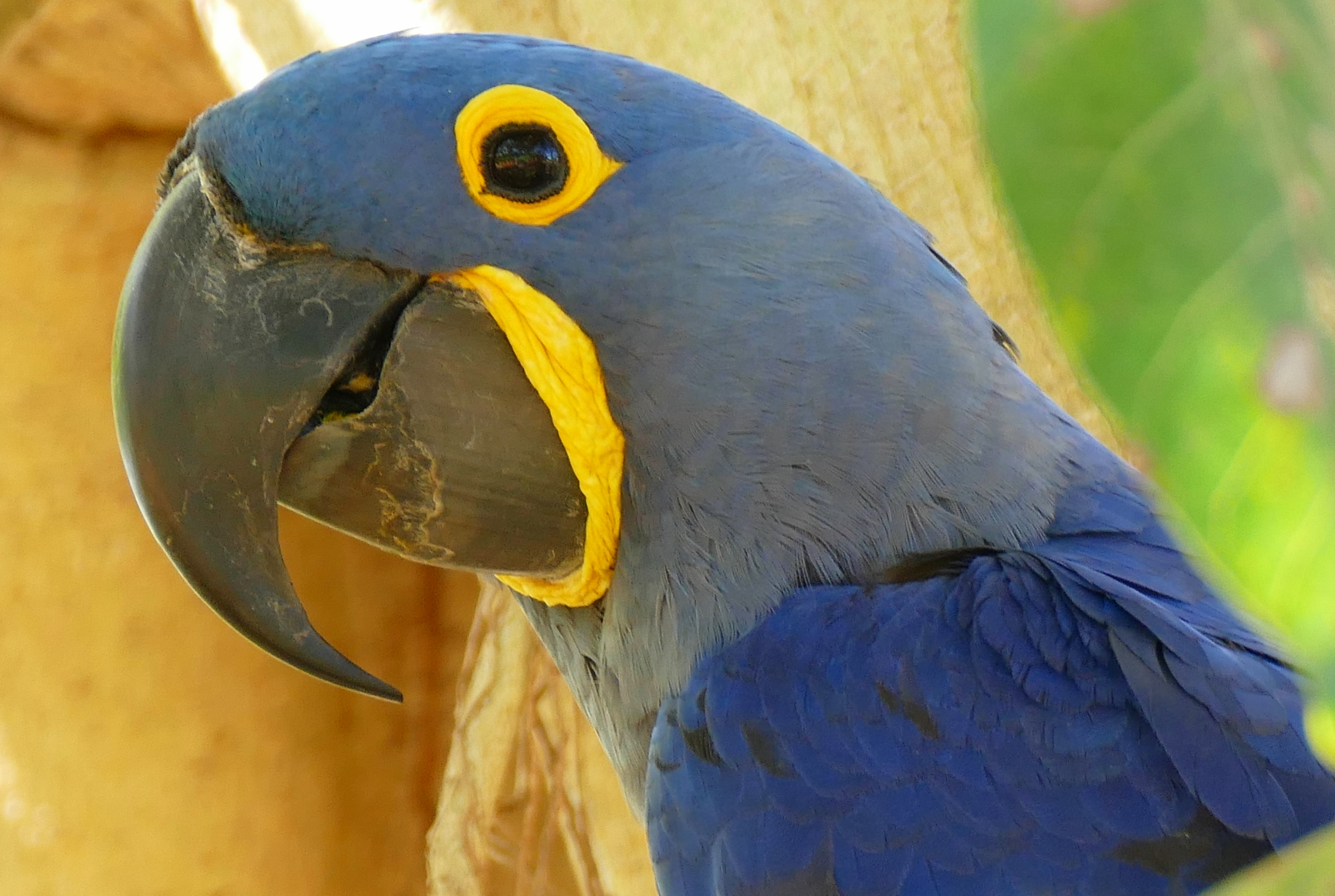 Transpantaneira, Poconé, Mato Grosso, BRAZIL